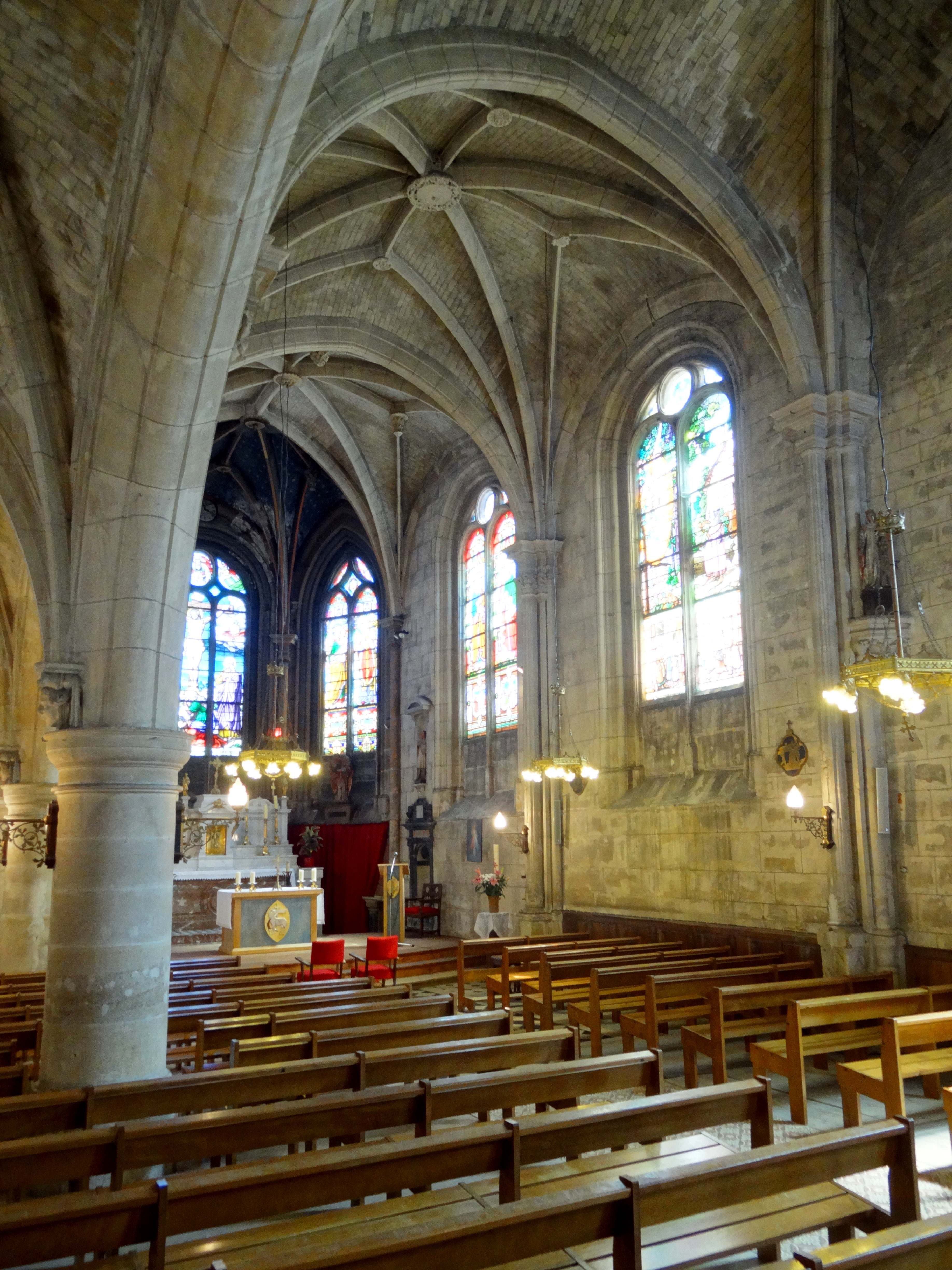 Intérieur de l'église - voir titre.